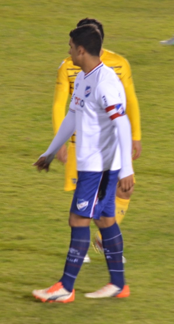 Imagen del partido disputado entre Nacional y Boca Juniors, en el estadio Gran Parque Central, por los cuartos de final de la Copa Libertadores 2016